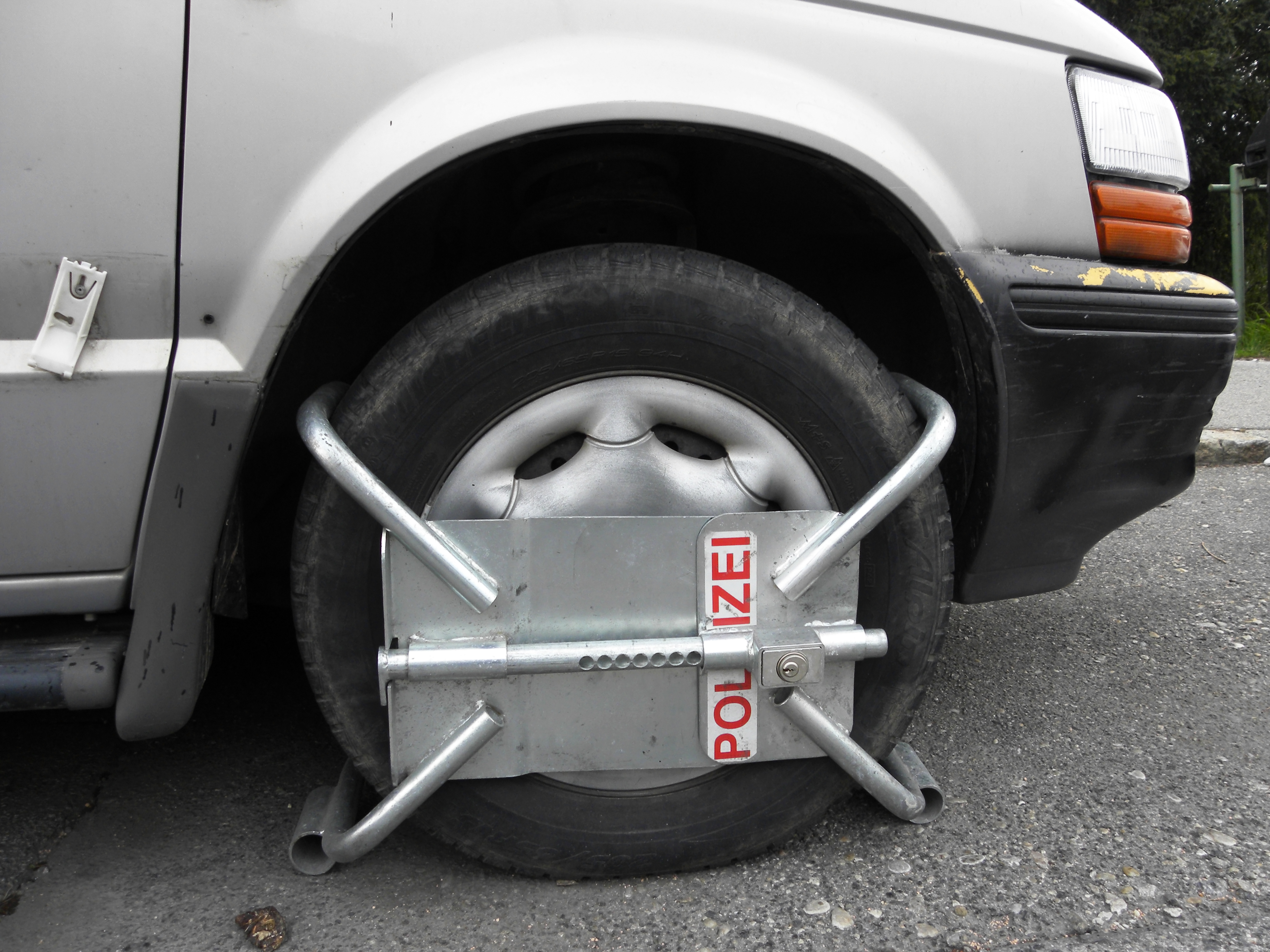 An einem Autorad angebrachte Wegfahrsperre, gefunden im 14. Bezirk in Wien, in der Breitenseer Straße.